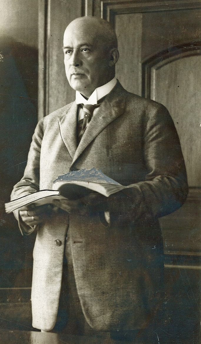 Borger With. Ukjent fotograf, ca. 1930 (iflg. Digitalt museum). Fra Byhistorisk samling hos Oslo Museum.